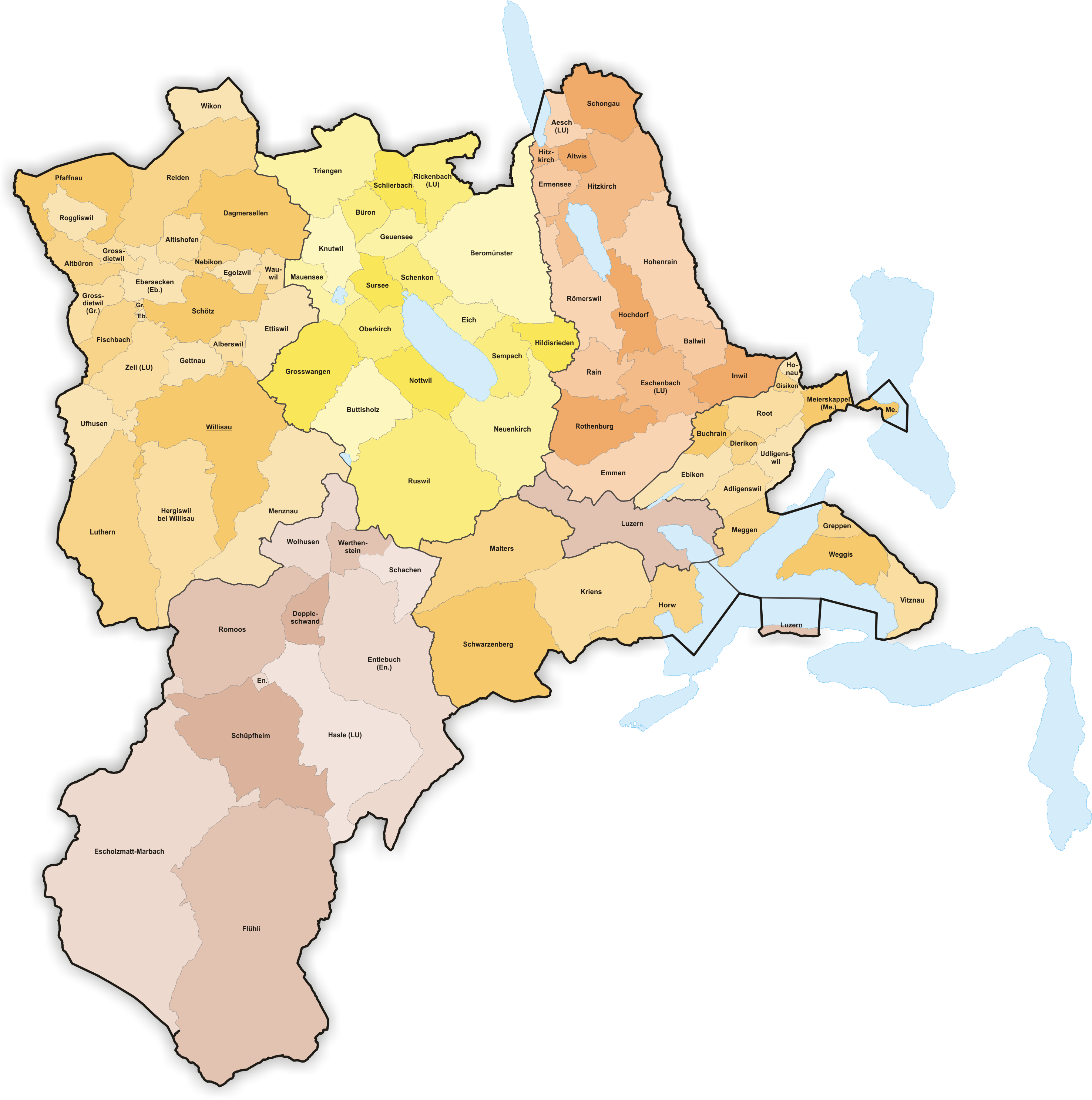 Municipalities in Canton Luzern